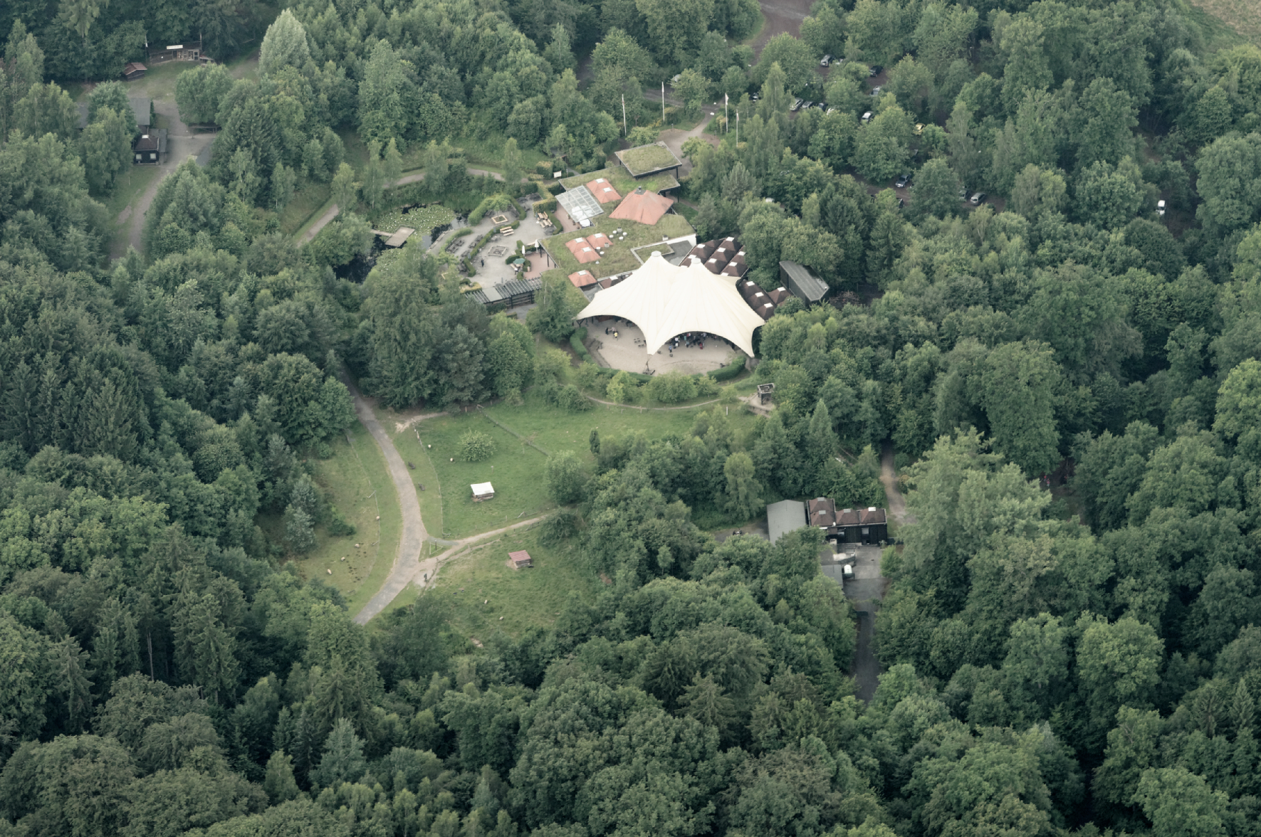 Arnsberg: Eingangsbereich Wildwald Voßwinkel (Fotoflug Sauerland Nord)